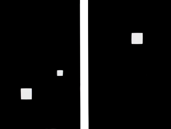 Nachempfundener Screenhot Odyssey Table Tennis